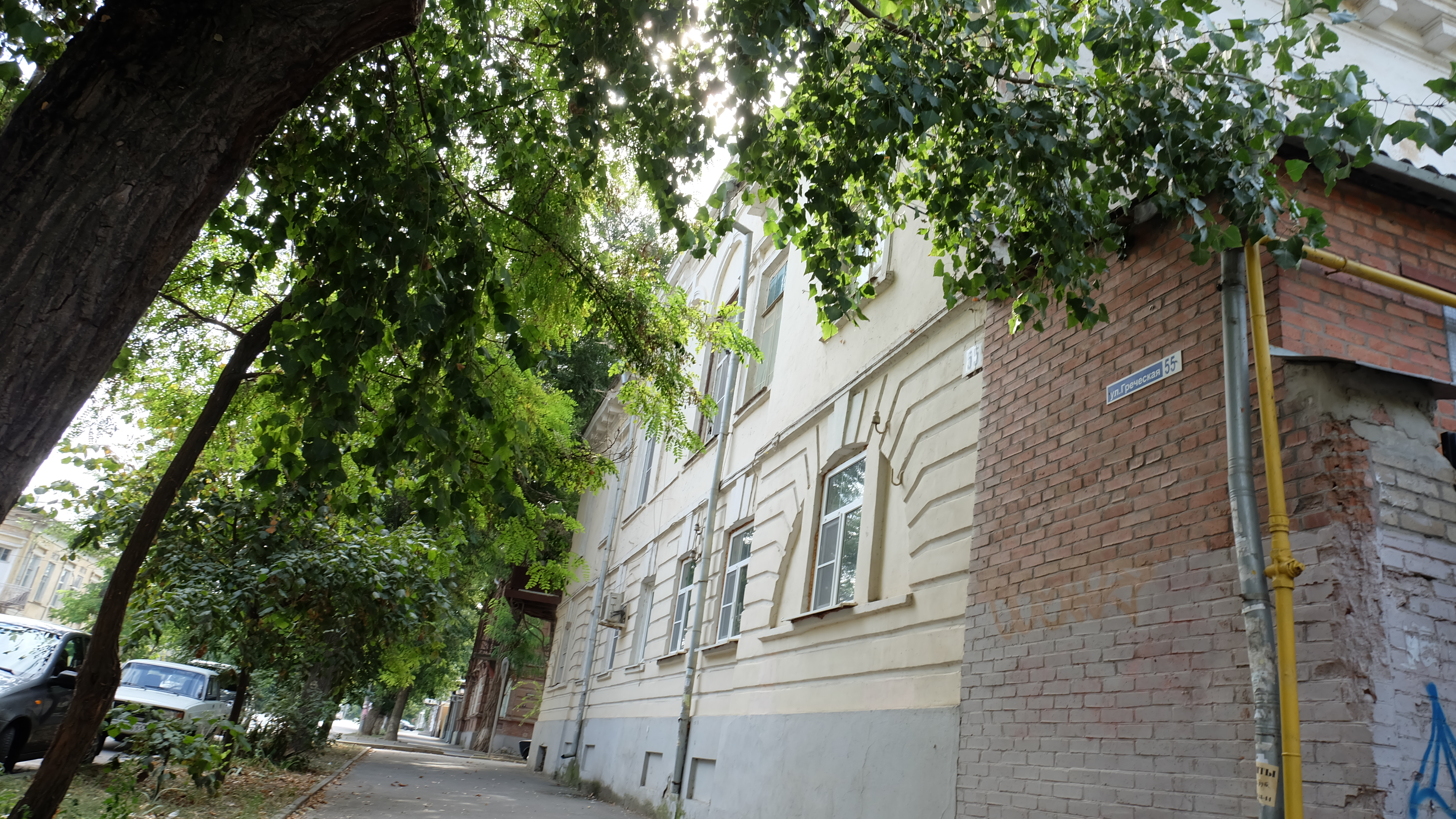 Здание городской библтотеки, которую посещал писатель А.П. Чехов: улица Греческая, 55, Таганрог, Ростовская область